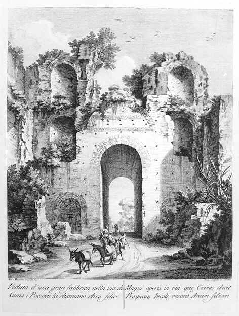 Cumae (municipality of Pozzuoli): Arco Felice